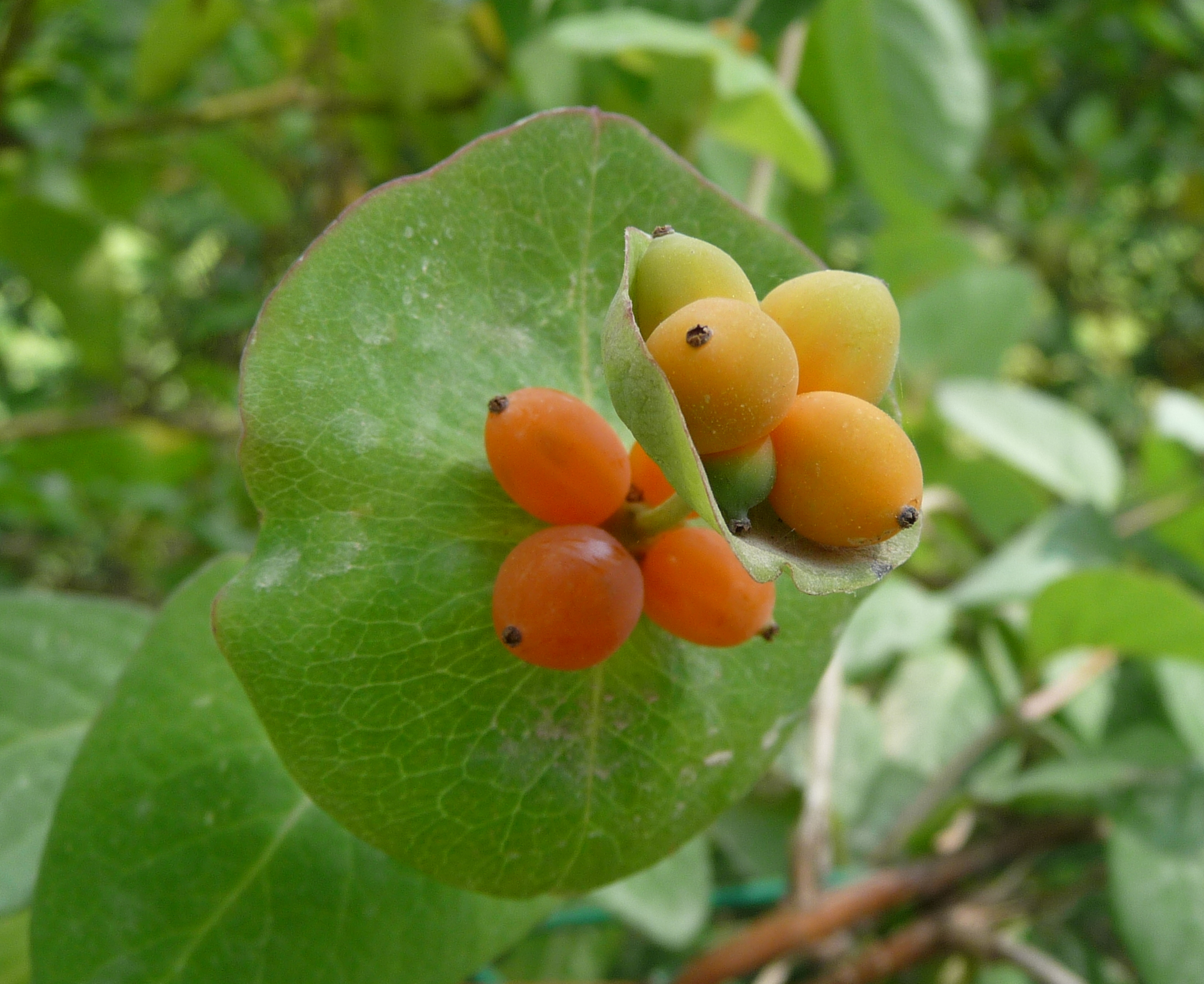 Lonicera implexa bei Livorno, Toskana